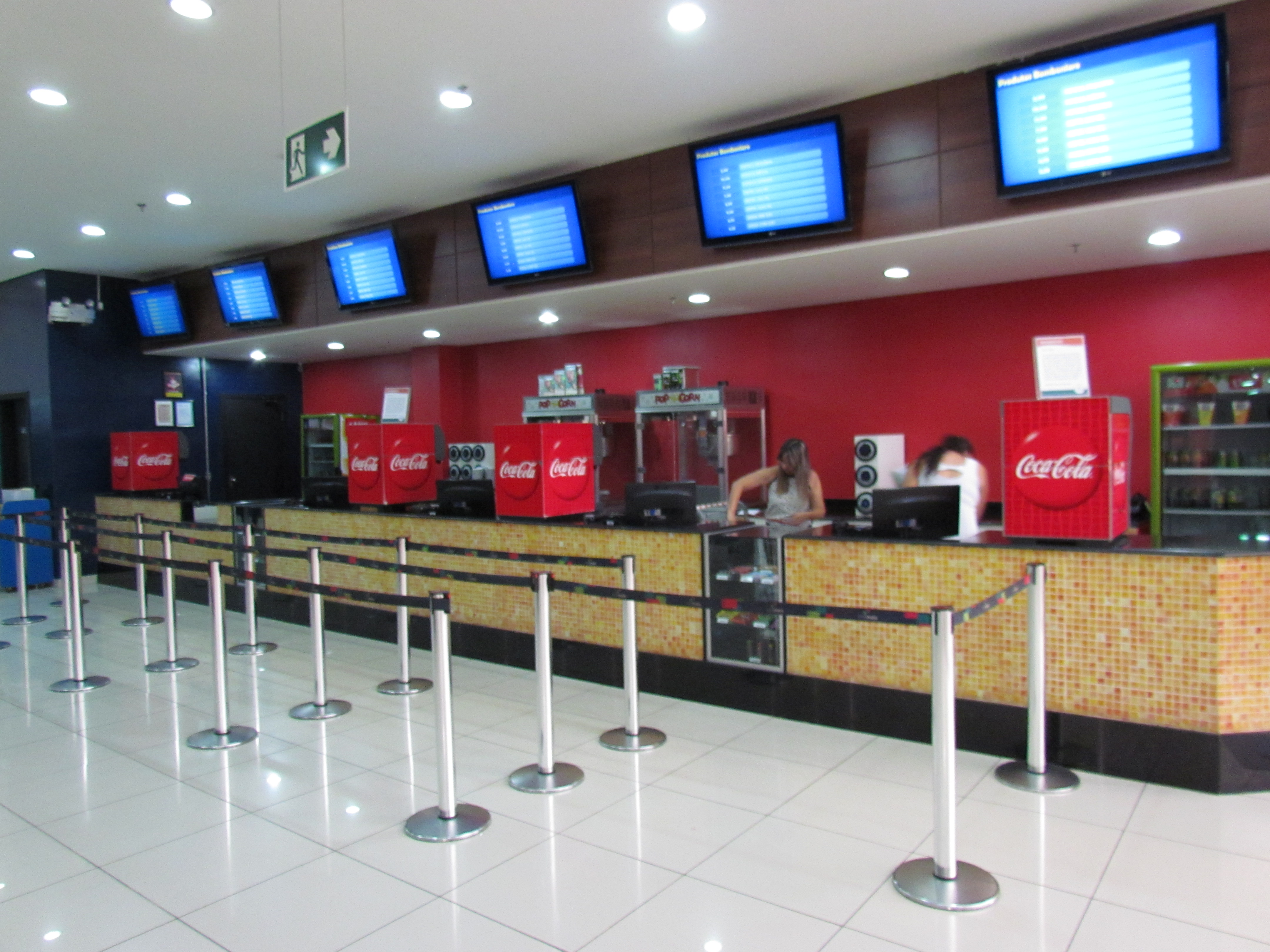 Vista lateral da bomboniere do Cinemais Montes Claros